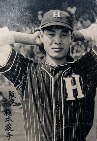 新人年の梶本隆夫